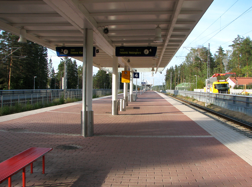 Hiekkaharju train station in Vantaa, Finland. Photo by Antti Havukainen.